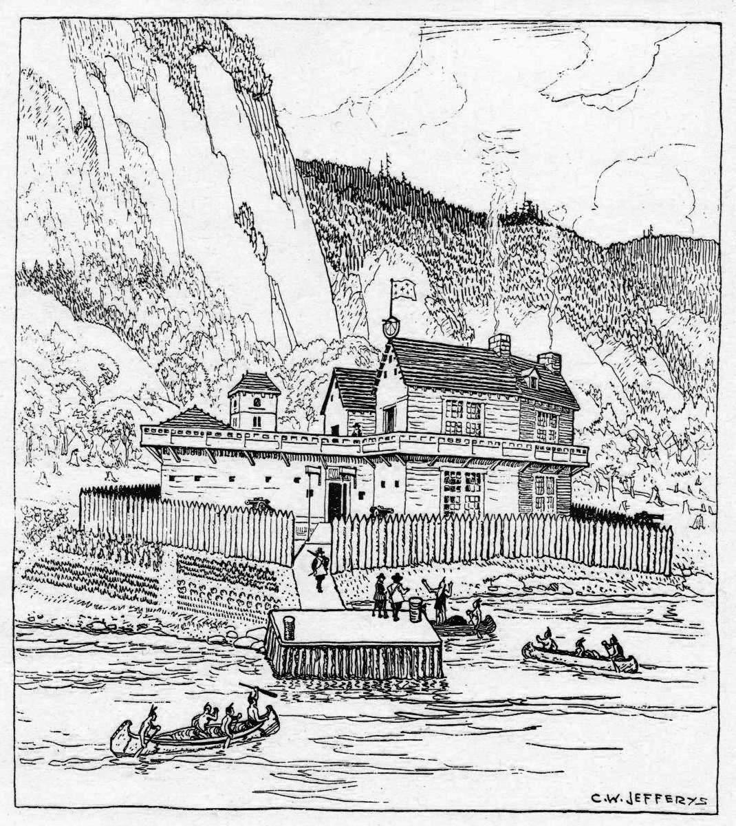 Quebec settlement, 1608